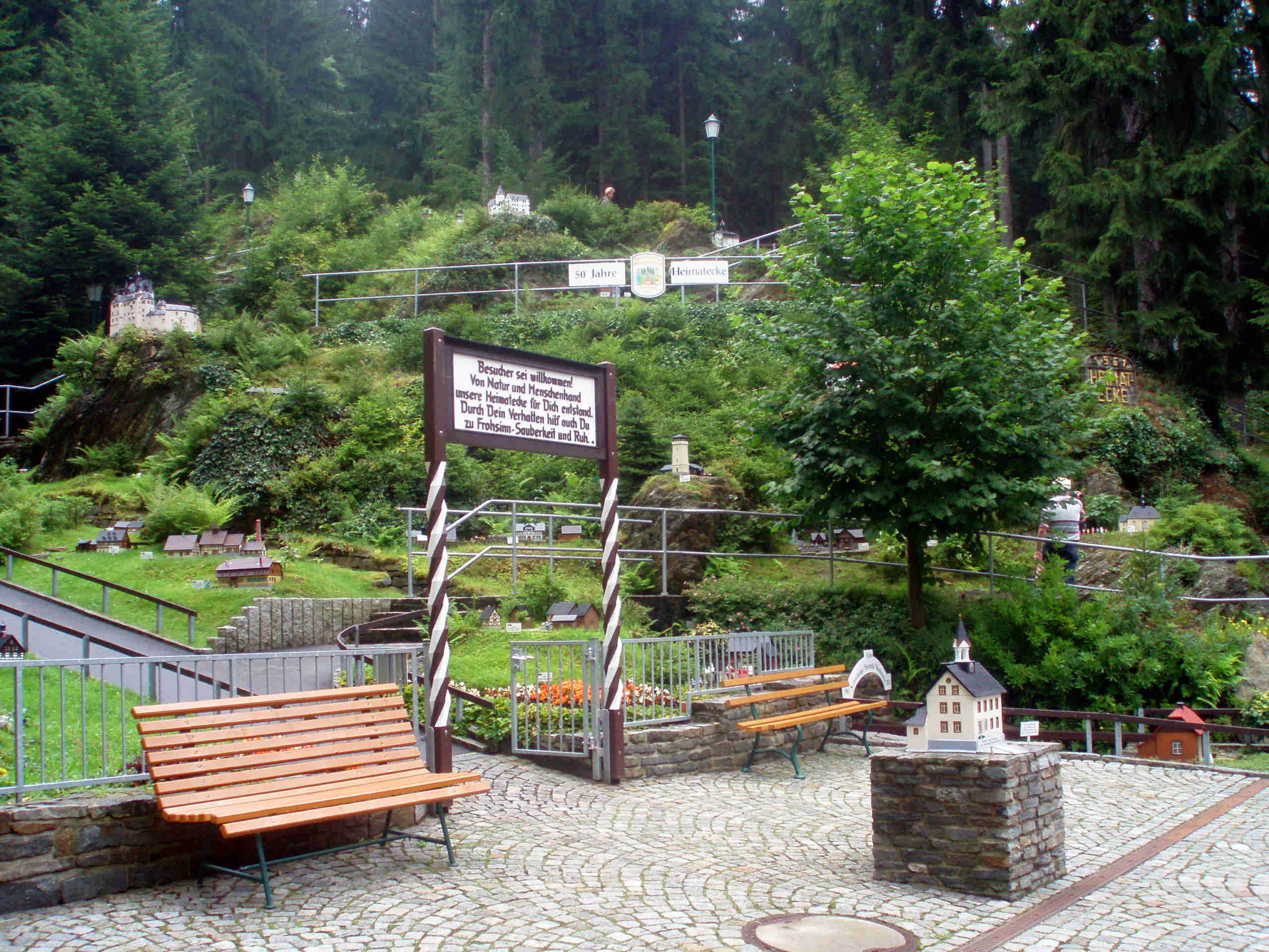 Eingangsbereich der Heimatecke Waschleithe